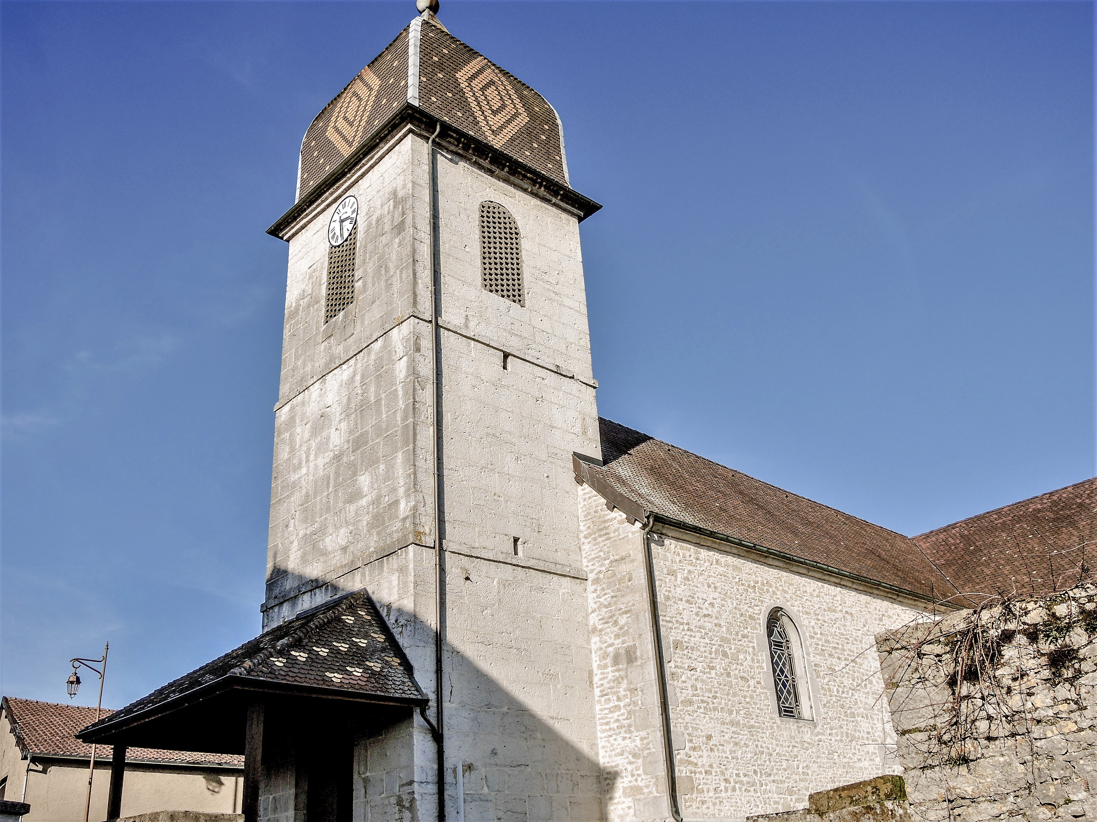 Eglise Saint-Léger de Pompierre-sur-Doubs